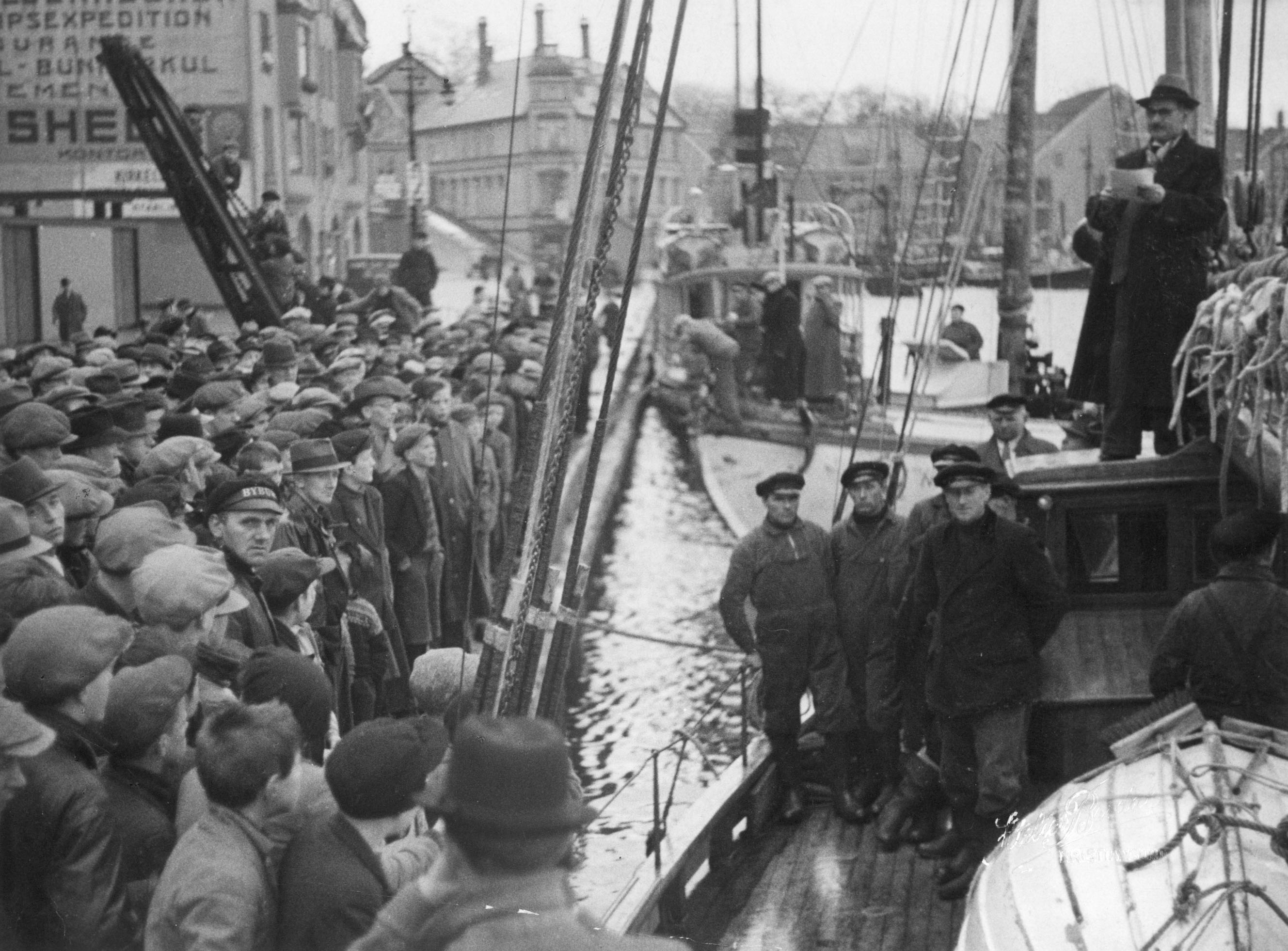 RS 41 "Christian Bugge" med skipper John Bakken Hyldes ved ankomst Kristiansund etter Rokta forliset